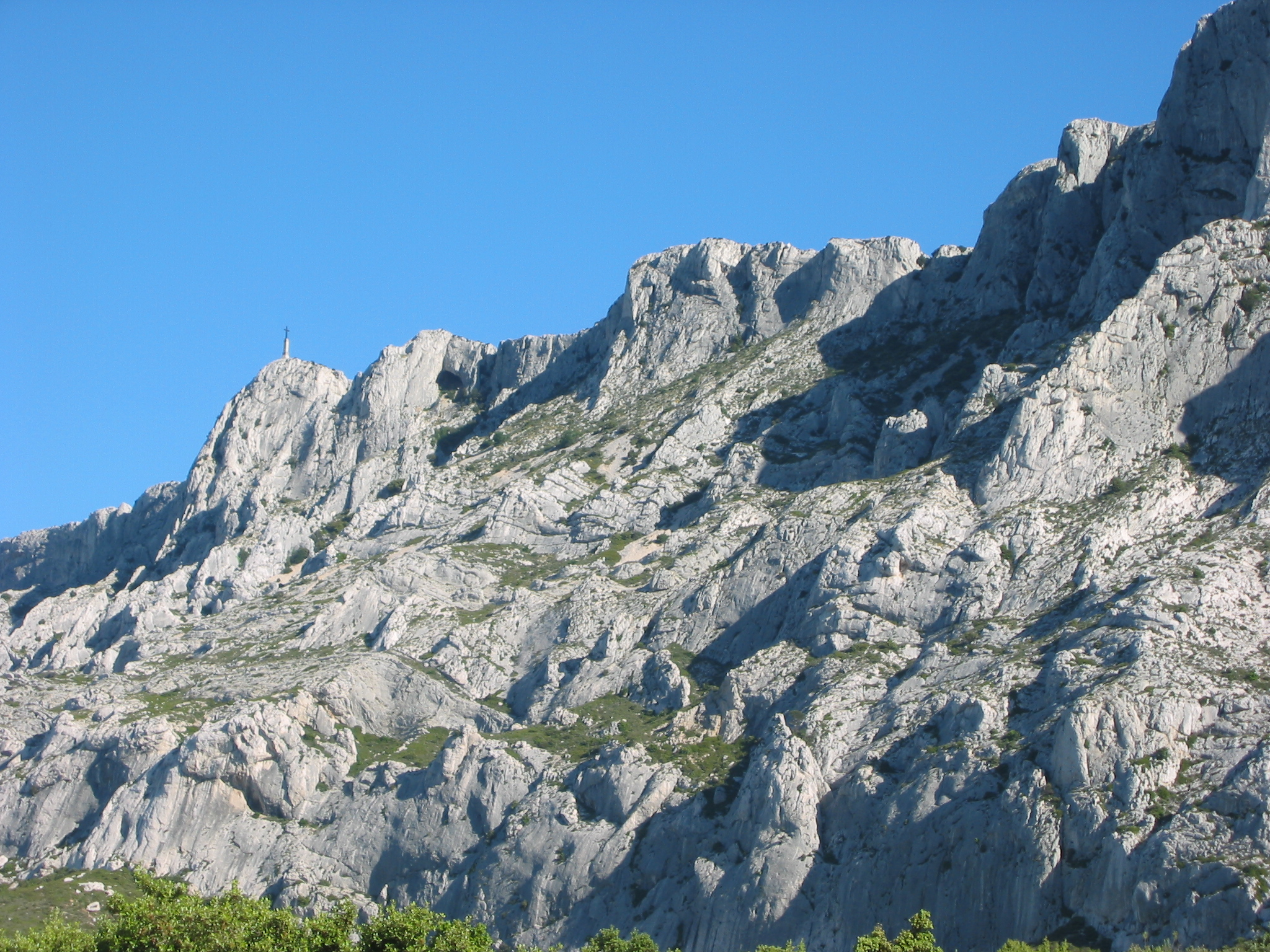 La Montagne Sainte-Victoire de près, côté sud. (France, Bouches-du-Rhône) Photo prise le 31 mai 2002, depuis la route de Cézanne (D17) entre Le Tholonet et Beaurecueil